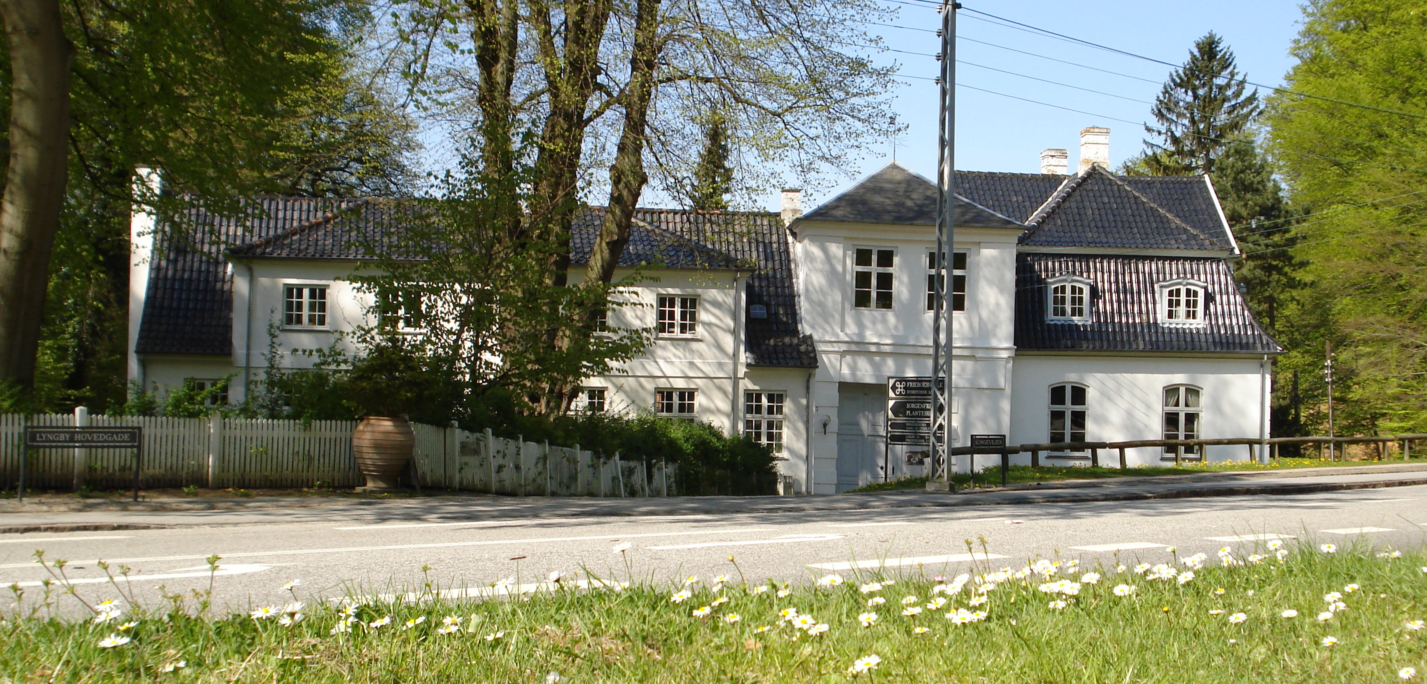 Landstedet Frieboeshvile i Kongens Lyngby på Lyngby Hovedgade.